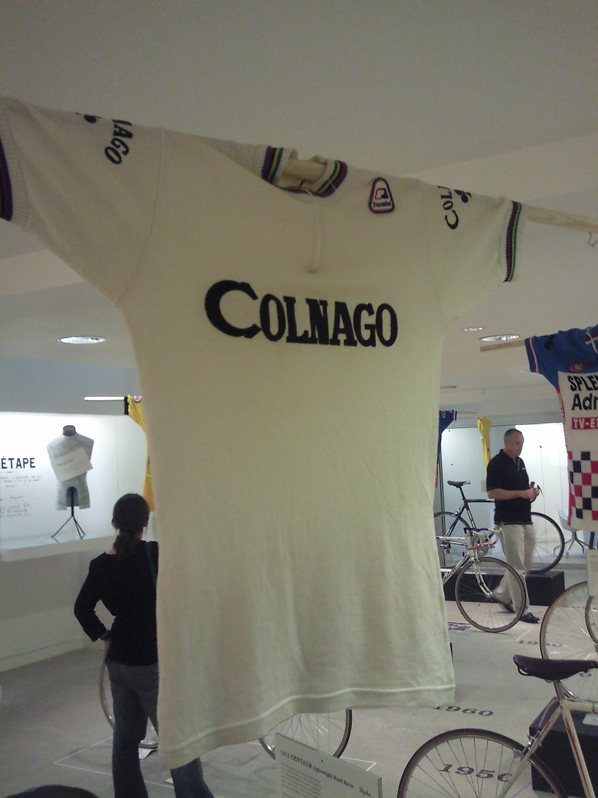 Conago jersey